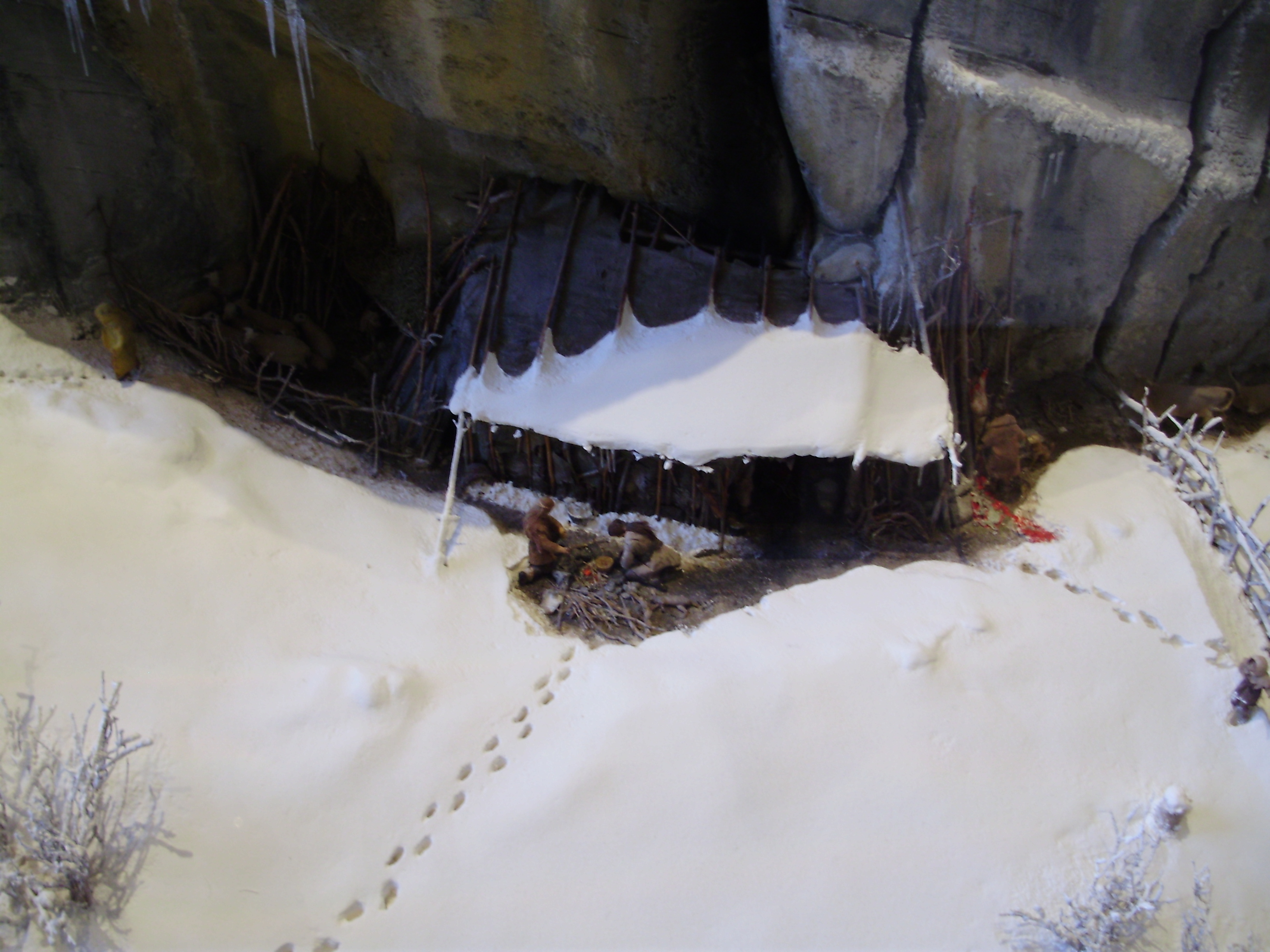 Maquette de l'abri sous roche de Sassenage (Site archéologique de la Grande Rivoire), maquette exposée au musée de l'Ancien Évêché - Patrimoines de l'Isère à Grenoble